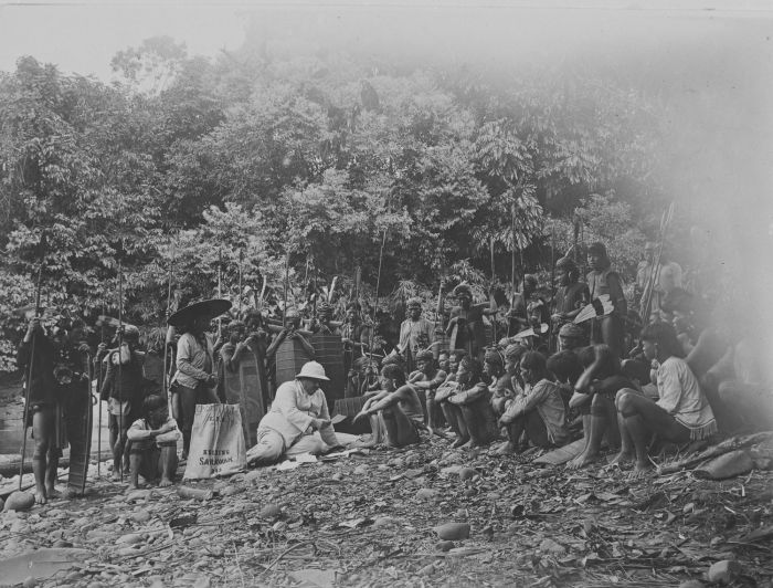 foto. Een Europeaan wordt op de oever van een rivier omringd door Kajan Dajak krijgers en bevolking tijdens een expeditie naar de berg Boekit Batoe op Serawak